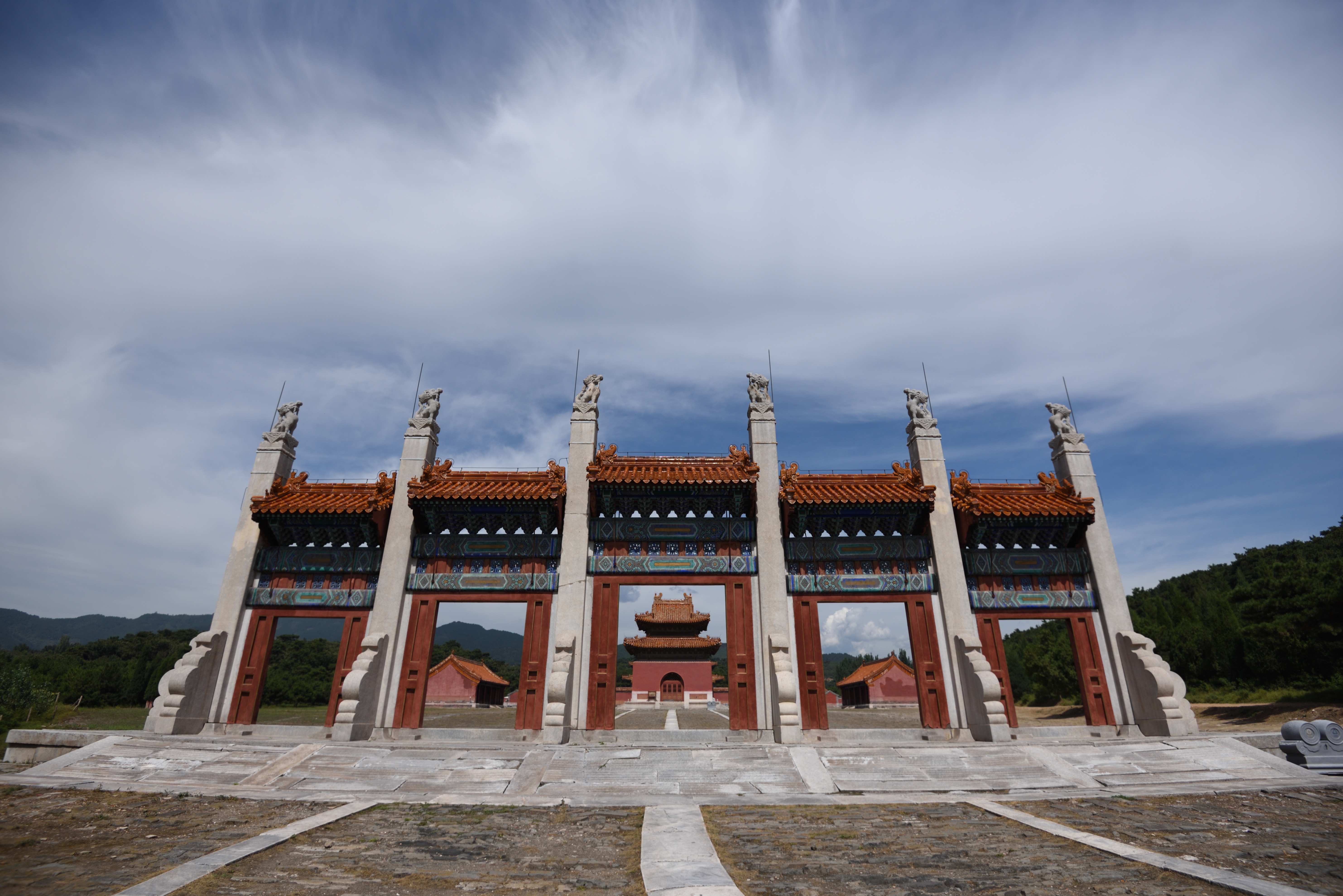 清景陵（康熙墓）